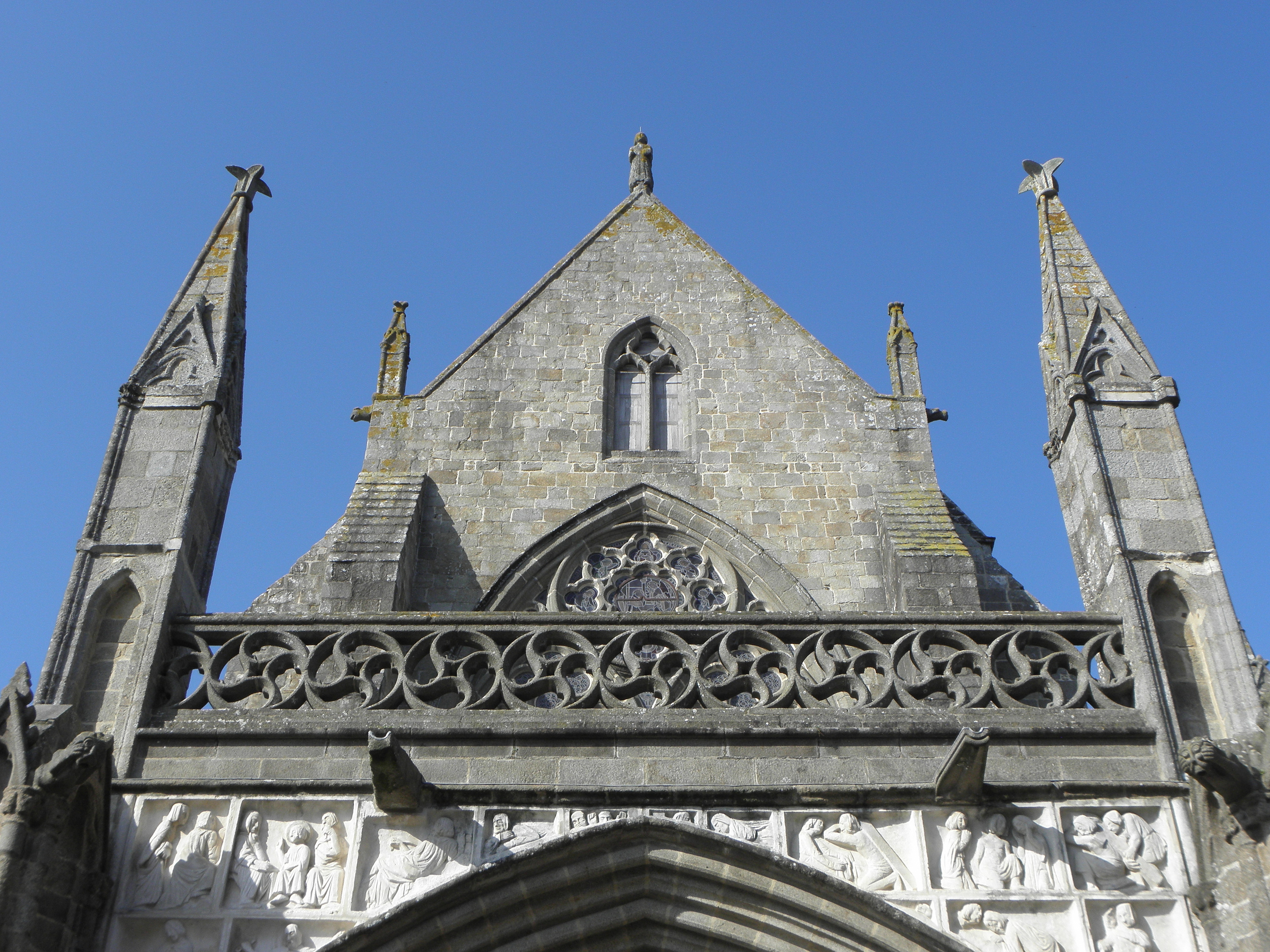 Façade méridionale du transept sud de la cathédrale Saint-Samson de Dol-de-Bretagne (35).